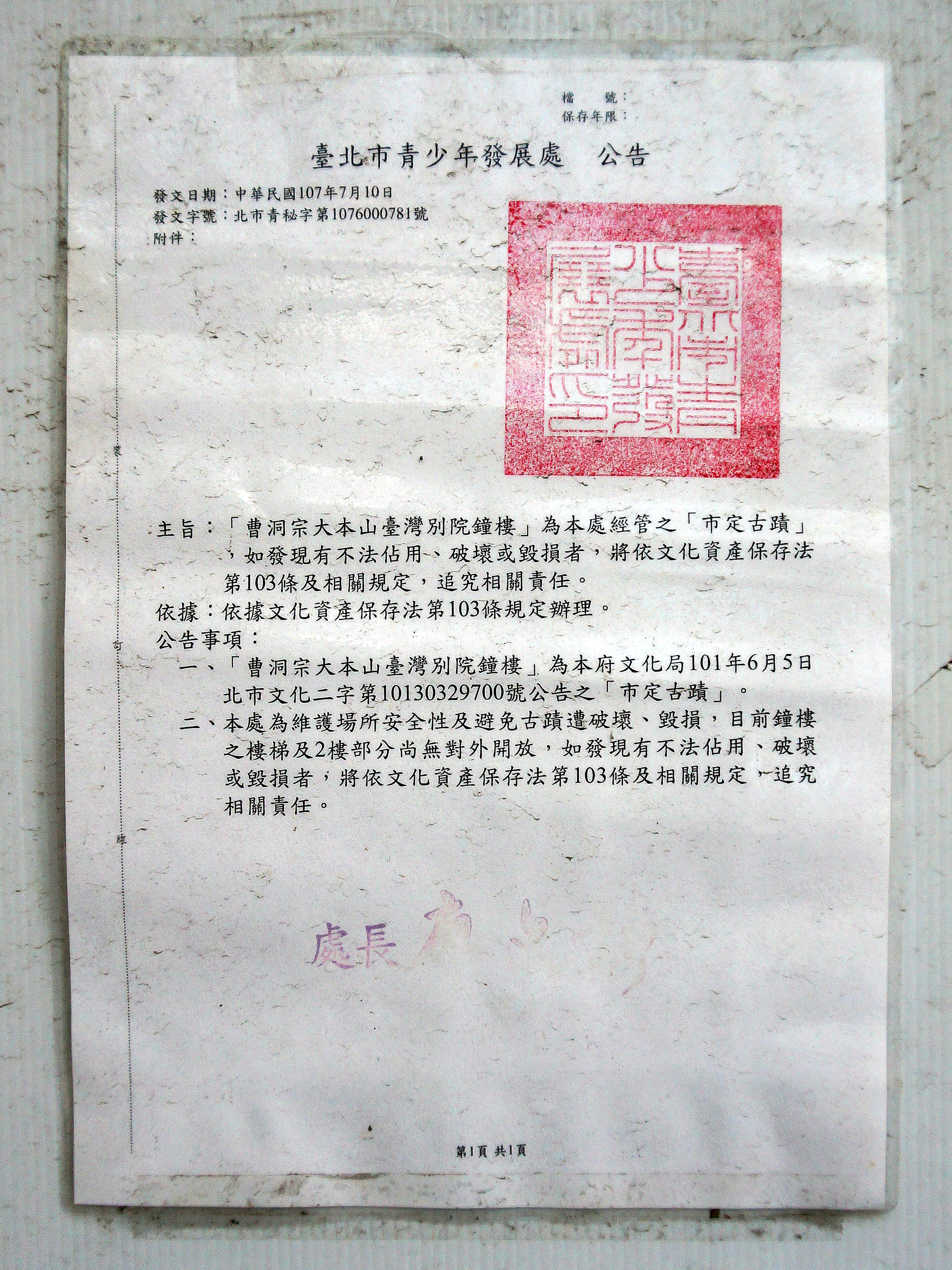 中文（台灣）: 2018年（中華民國107年）7月10日，臺北市青少年發展處「北市青秘字第1076000781號公告」：曹洞宗大本山臺灣別院鐘樓為臺北市青少年發展處經營管理之市定古蹟，鐘樓之樓梯及二樓不對外開放。